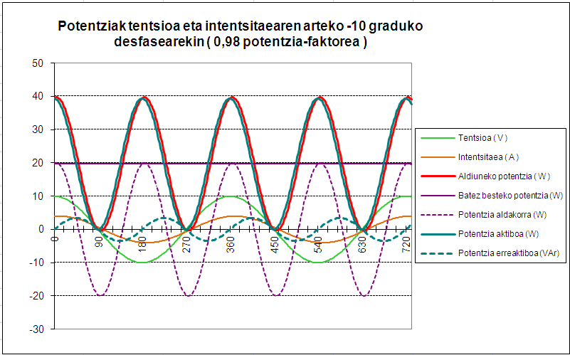 Aldiuneko potentzia elektrikoa korronte alternoko sistema batean eta bere deskonposaketa potentzia aktibo eta potentzia erreaktiboan; tentsioa eta korrontearen arteko desfasea -10 gradukoa denean.